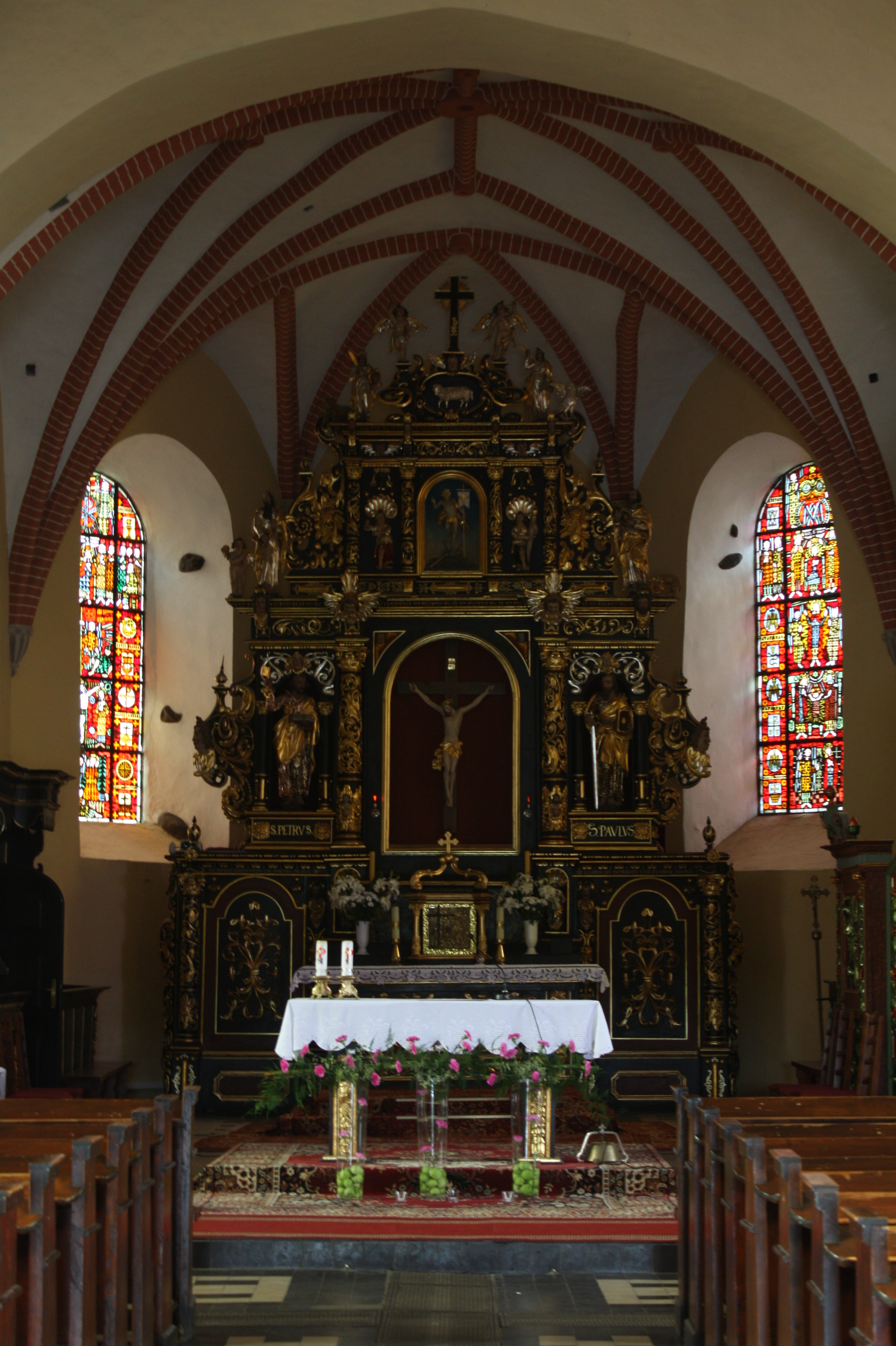 Węgorzewo, ul. Zamkowa 16 - dawny kościół ewangelicki, obecnie rzymskokatolicki parafialny p.w. świętych Piotra i Pawła, 1605-1611 (wnętrze) You can see all photographs in category Wikiekspedycja 2012. The making of this document was supported by Wikimedia Polska.